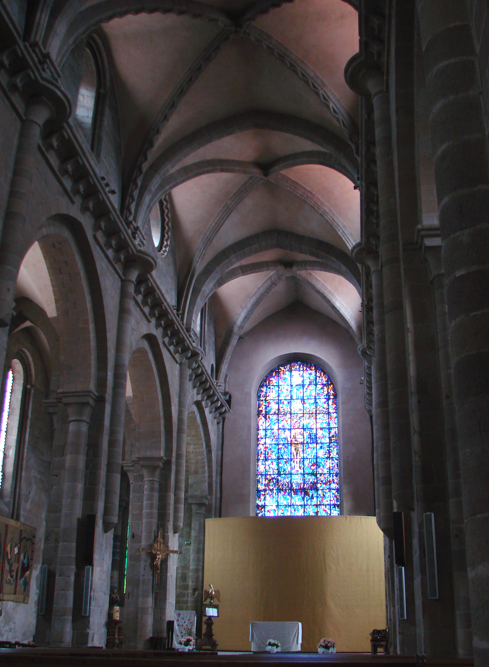 Cathédrale Notre-Dame de Tulle.XIIéme siècle.